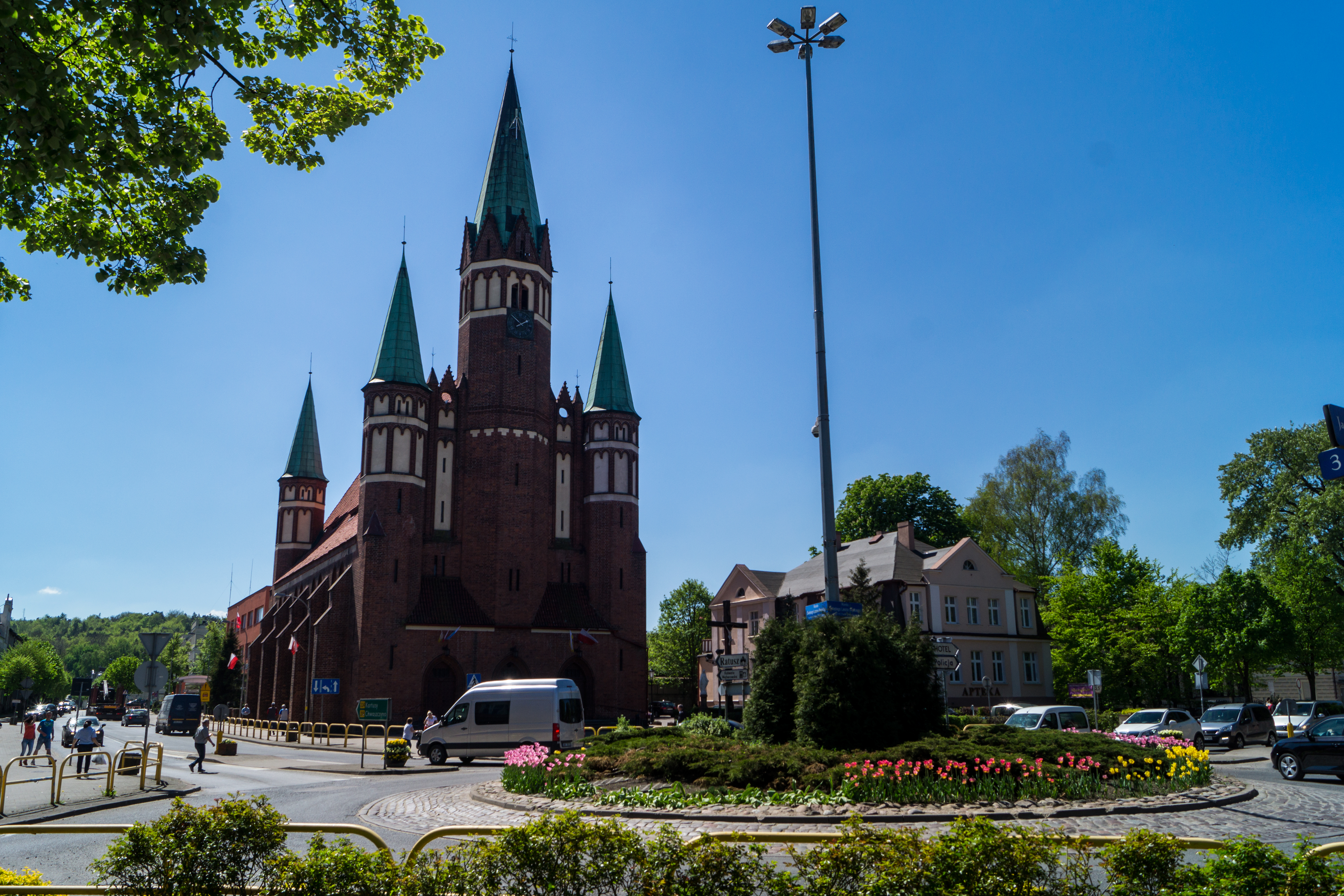 Widok na rondo Leona Wielkiego w Wejherowie w wiosennym wydaniu, w tle kościół pw. św. Stanisława Kostki.